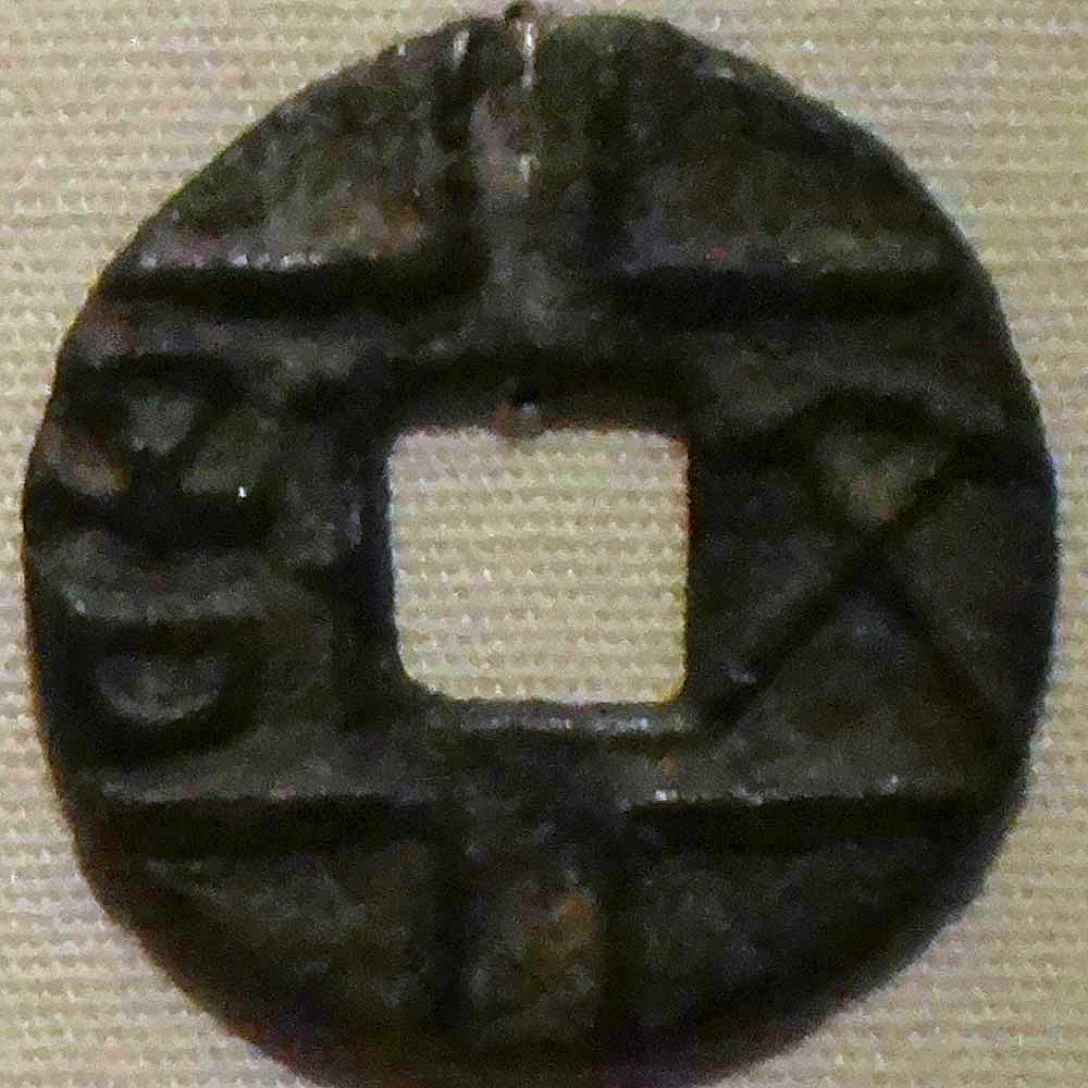 文信圜钱，战国时期文信候吕不韦封地所铸的钱币。拍摄于中国国家博物馆